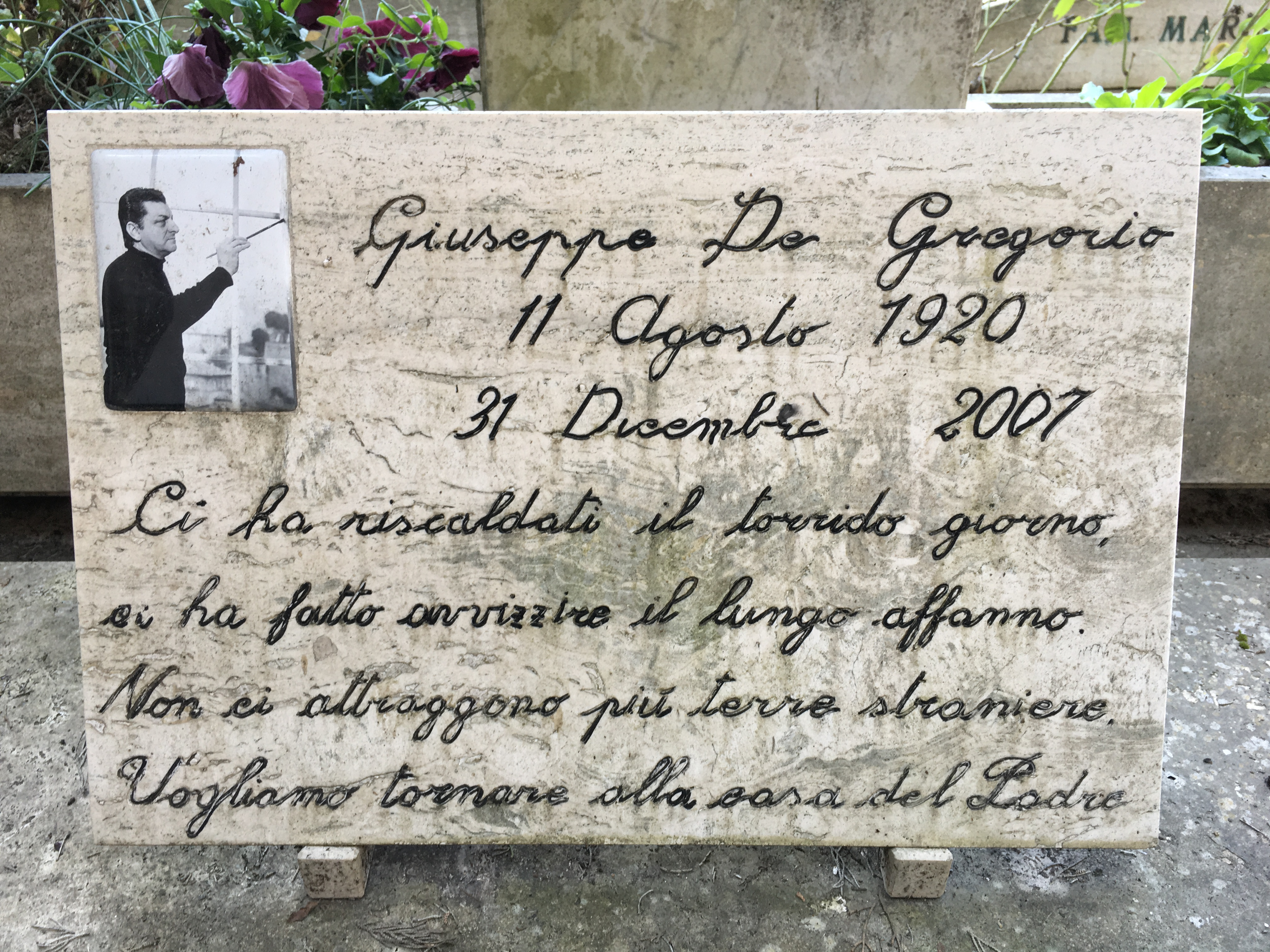 Cimitero monumentale di Spoleto